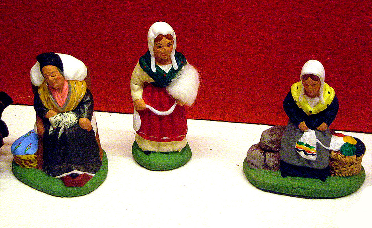 Fileuses de la crèche